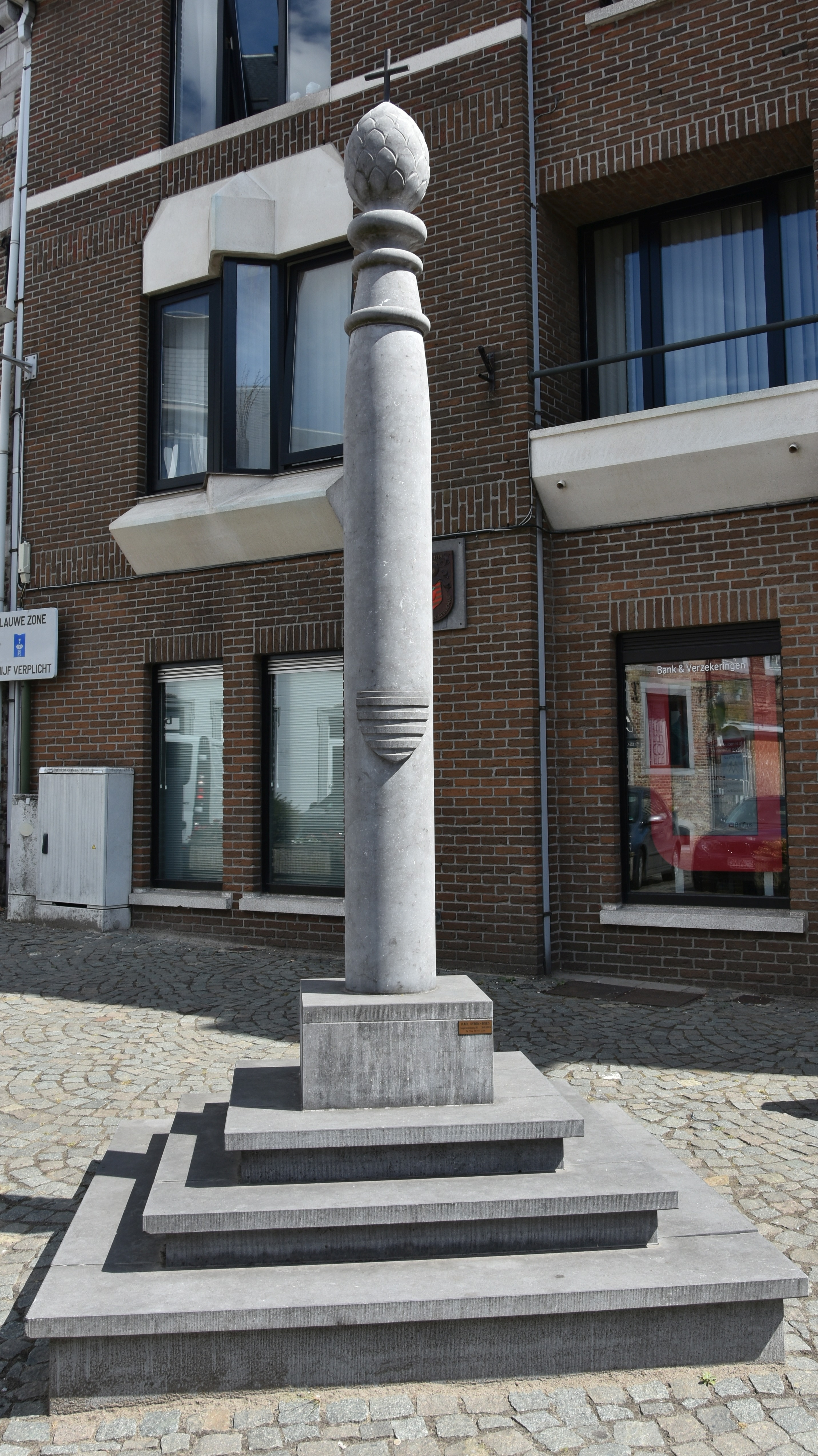 Perron Borgloon 10-08-2018 This photo of immovable heritage has been taken in the Flemish Region